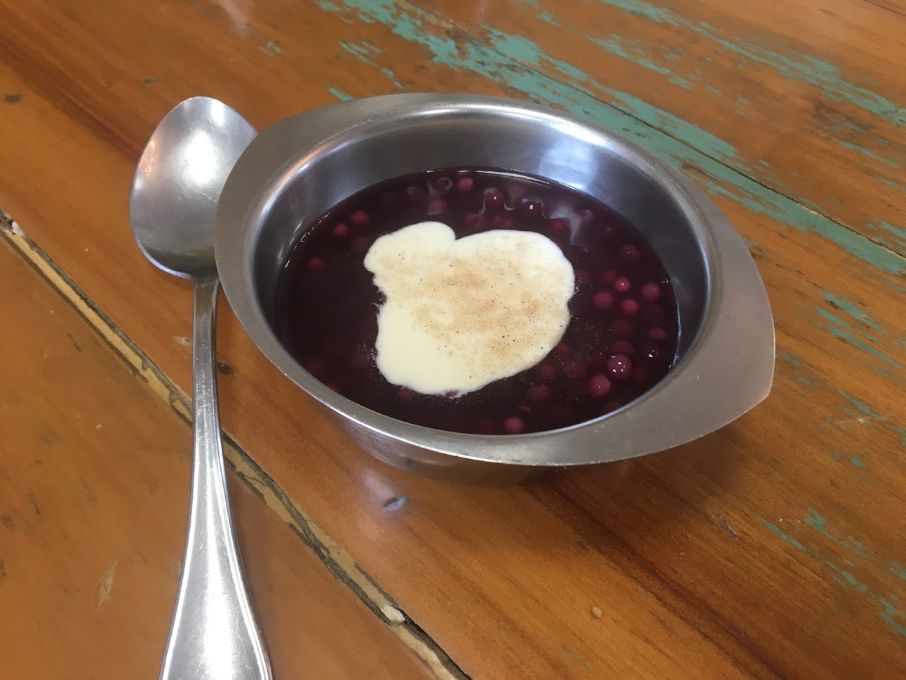 Sagu de vinho com creme e canela, uma sobremesa comum em restaurantes no sul do Brasil